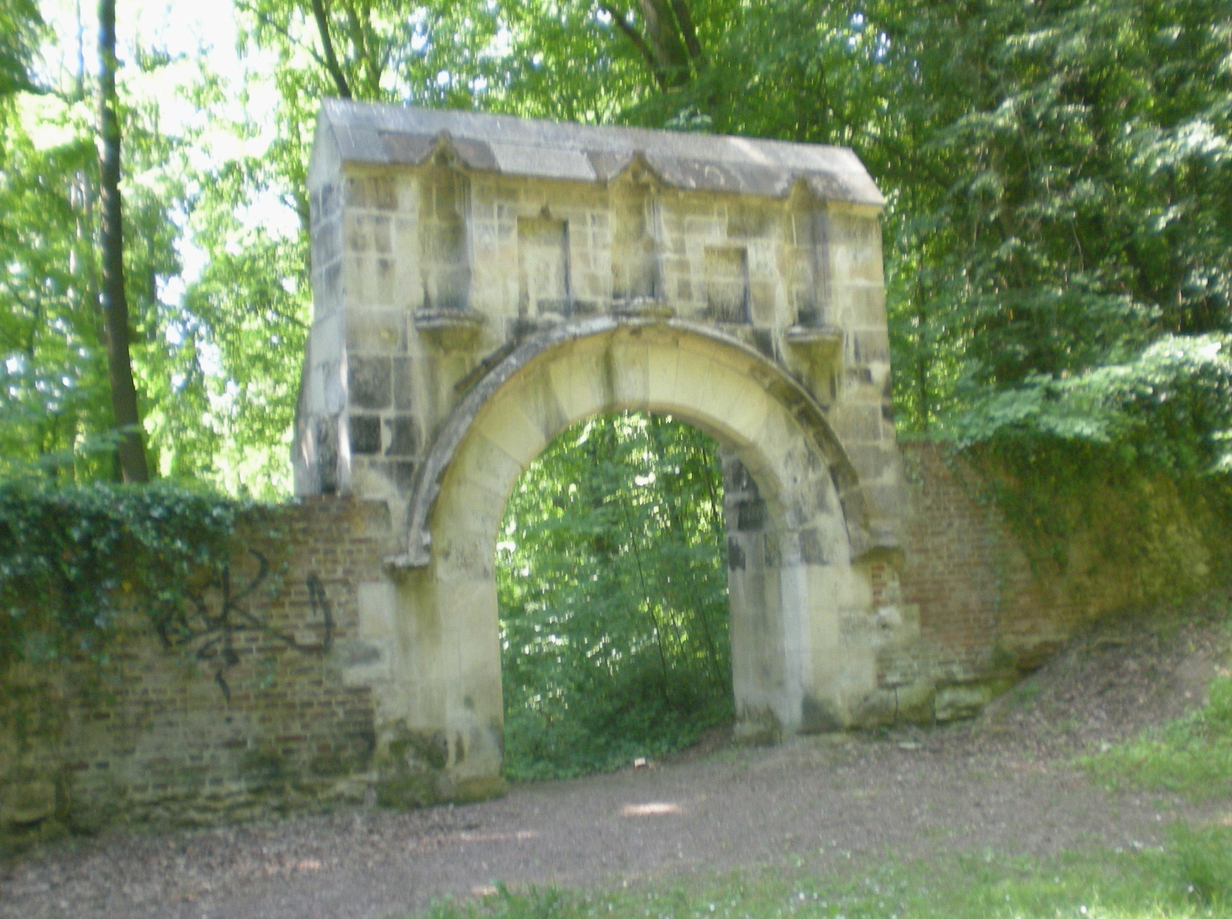 Le porche classé du couvent de la Garde